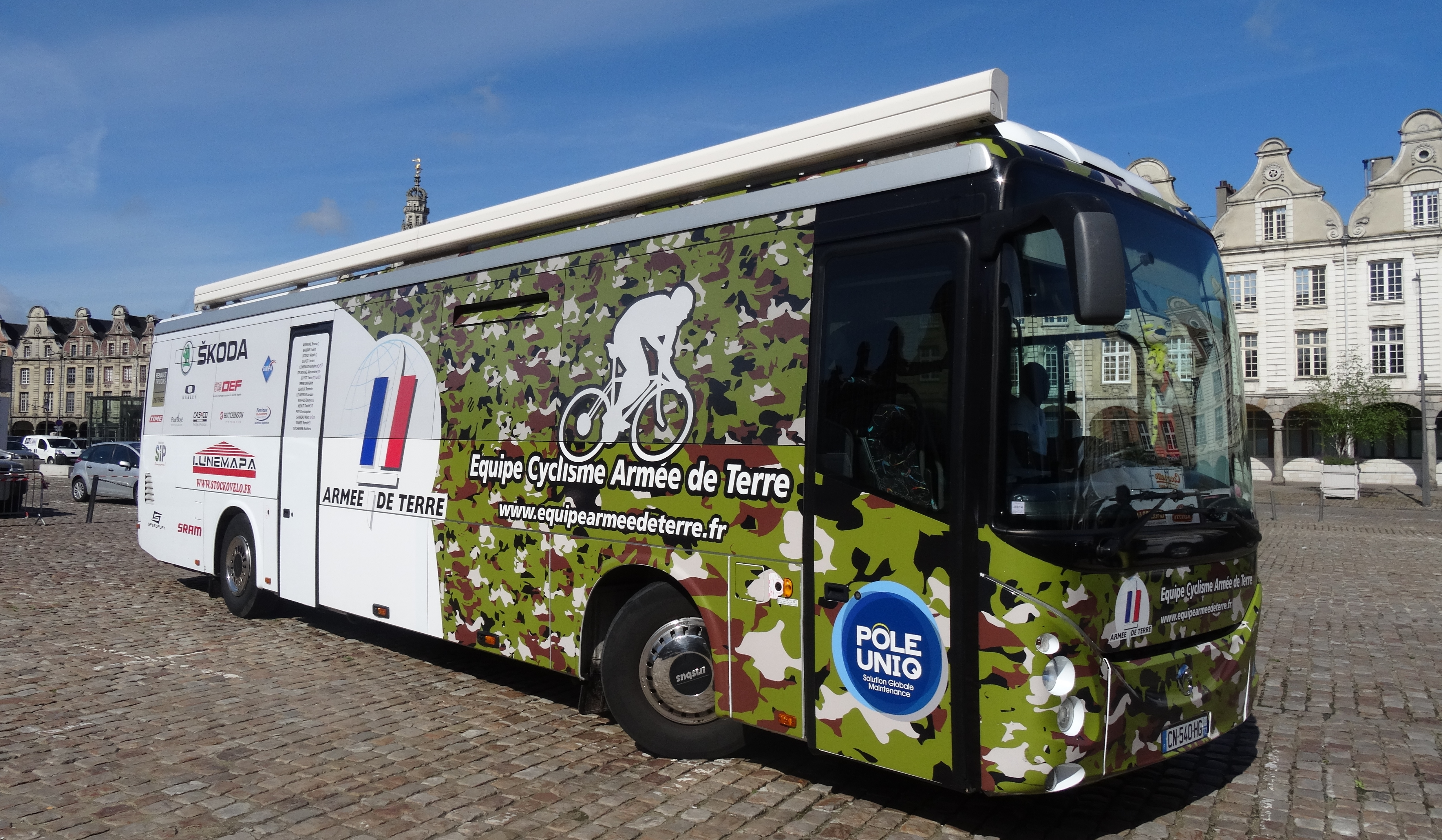 Reportage photographique réalisé le dimanche 25 mai 2014 à l'occasion du départ et de l'arrivée de la troisième étape du Paris-Arras Tour 2014 à Arras, Pas-de-Calais, Nord-Pas-de-Calais, France.